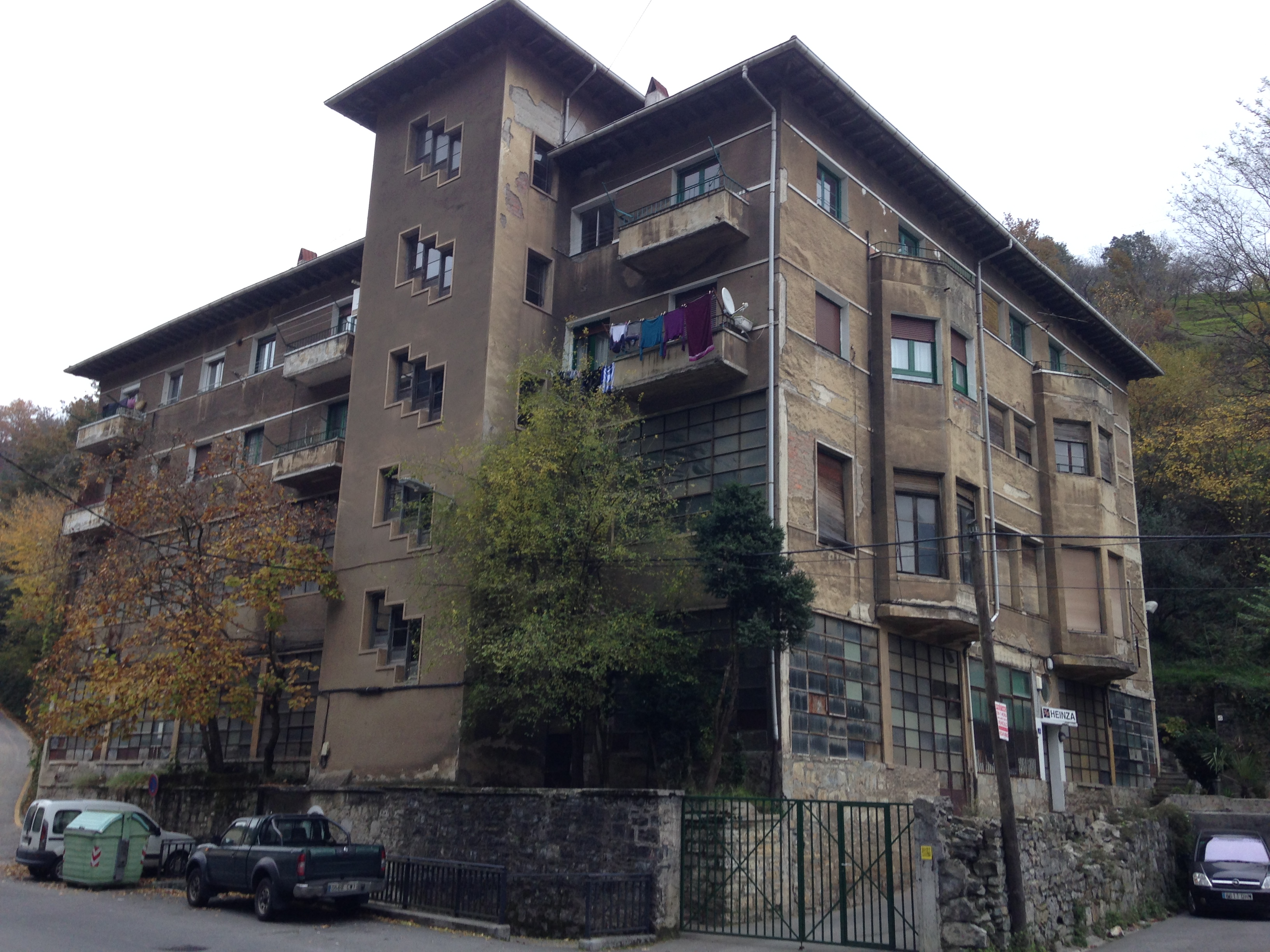 Edificio industrial y de viviendas en Eibar Guipúzcoa País Vasco (España)